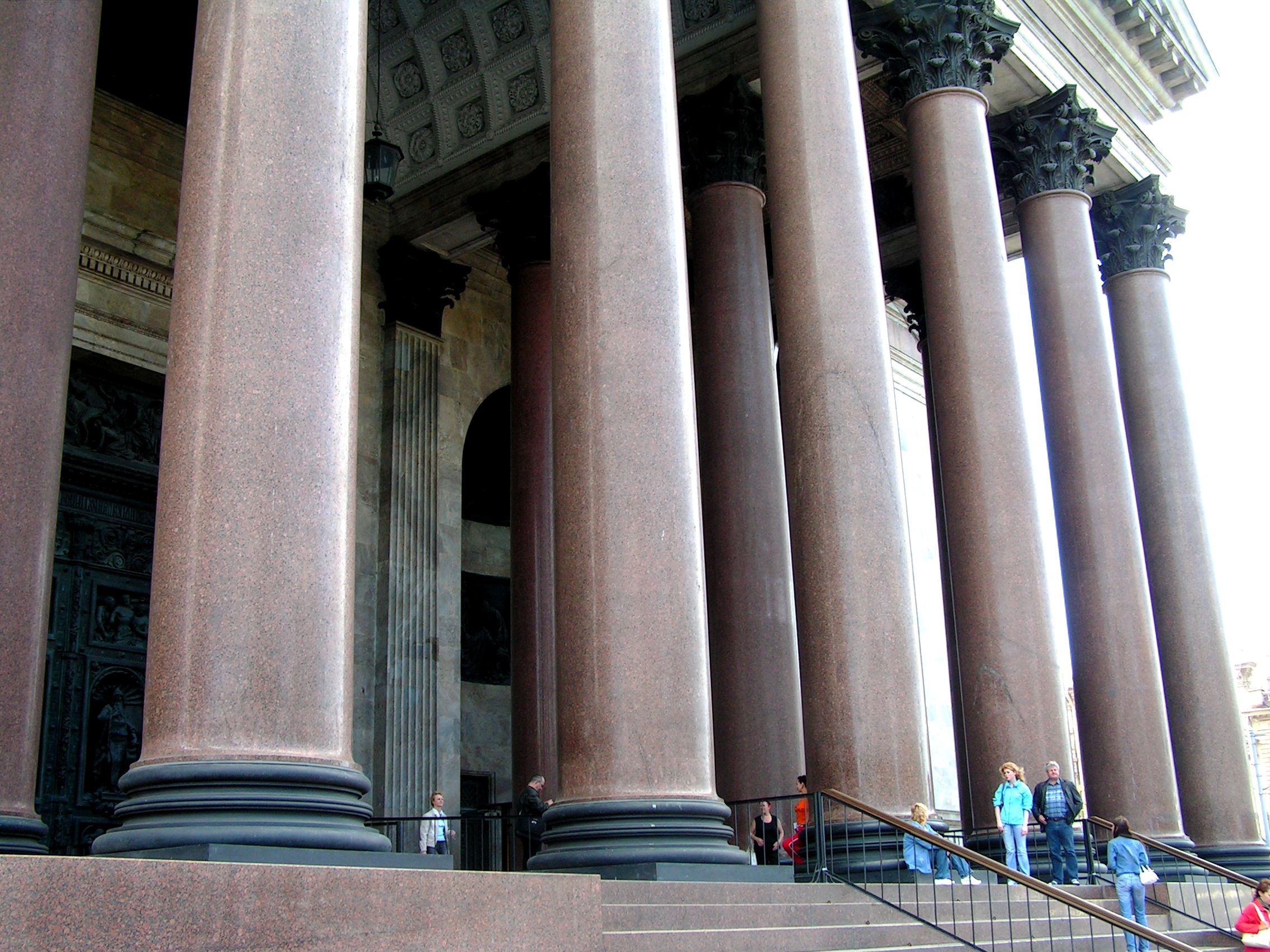 zuilengalerij van de Izaäkkathedraal